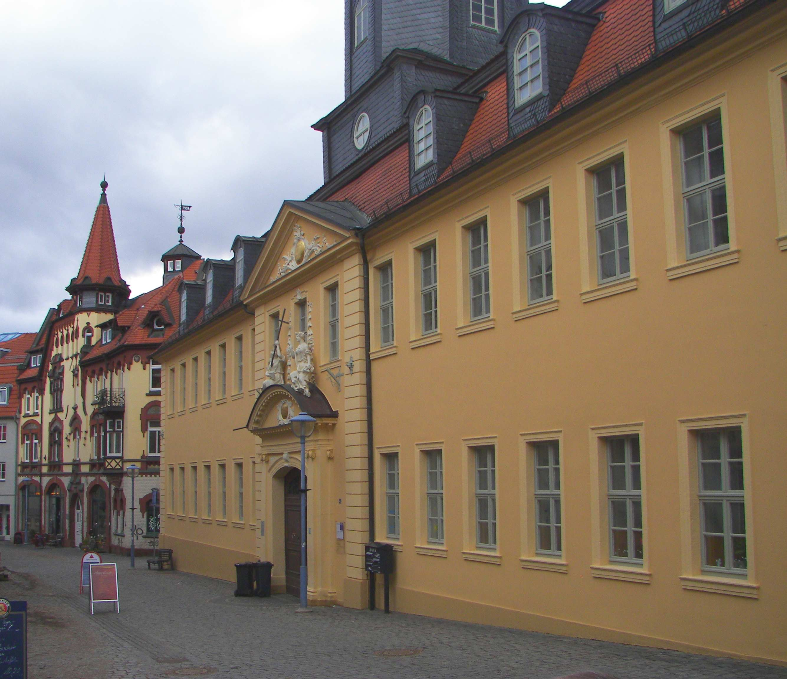 Das Hospital Mariae Magdalenae, Brühl 4, ist die älteste Wohlfahrtseinrichtung der Stadt Gotha